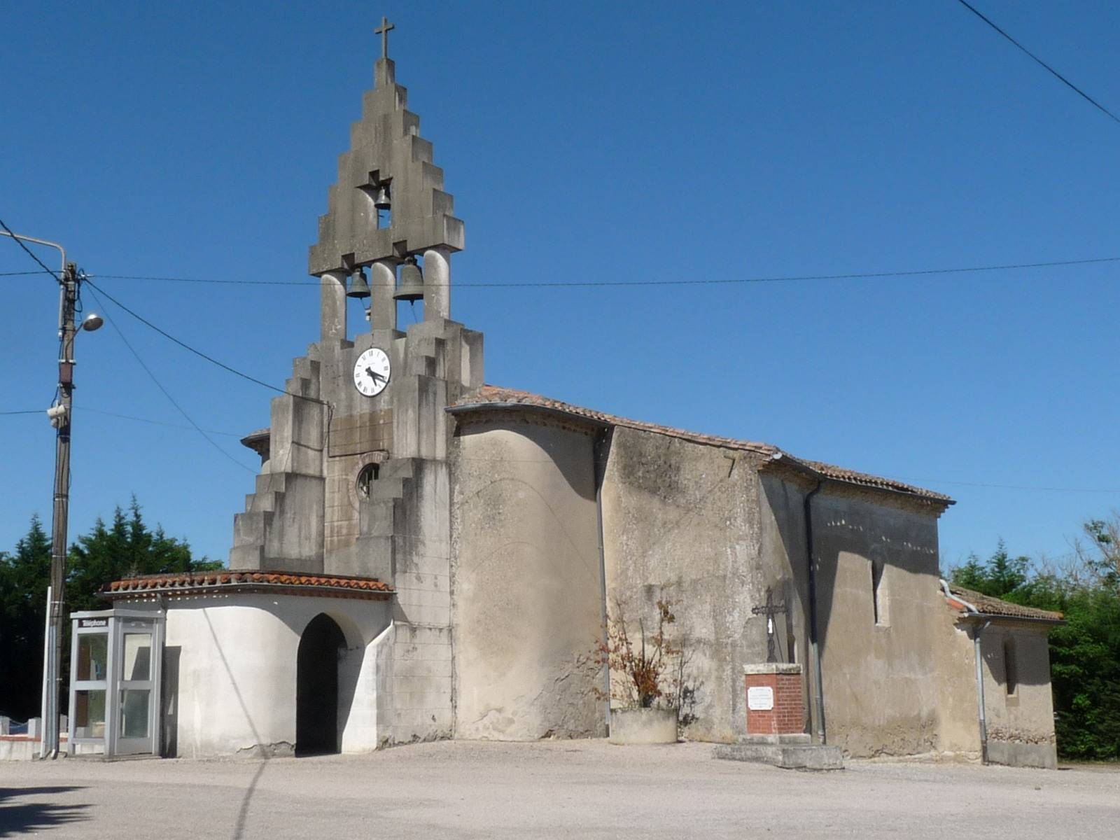 Eglise de Nogaret, Haute-Garonne, France